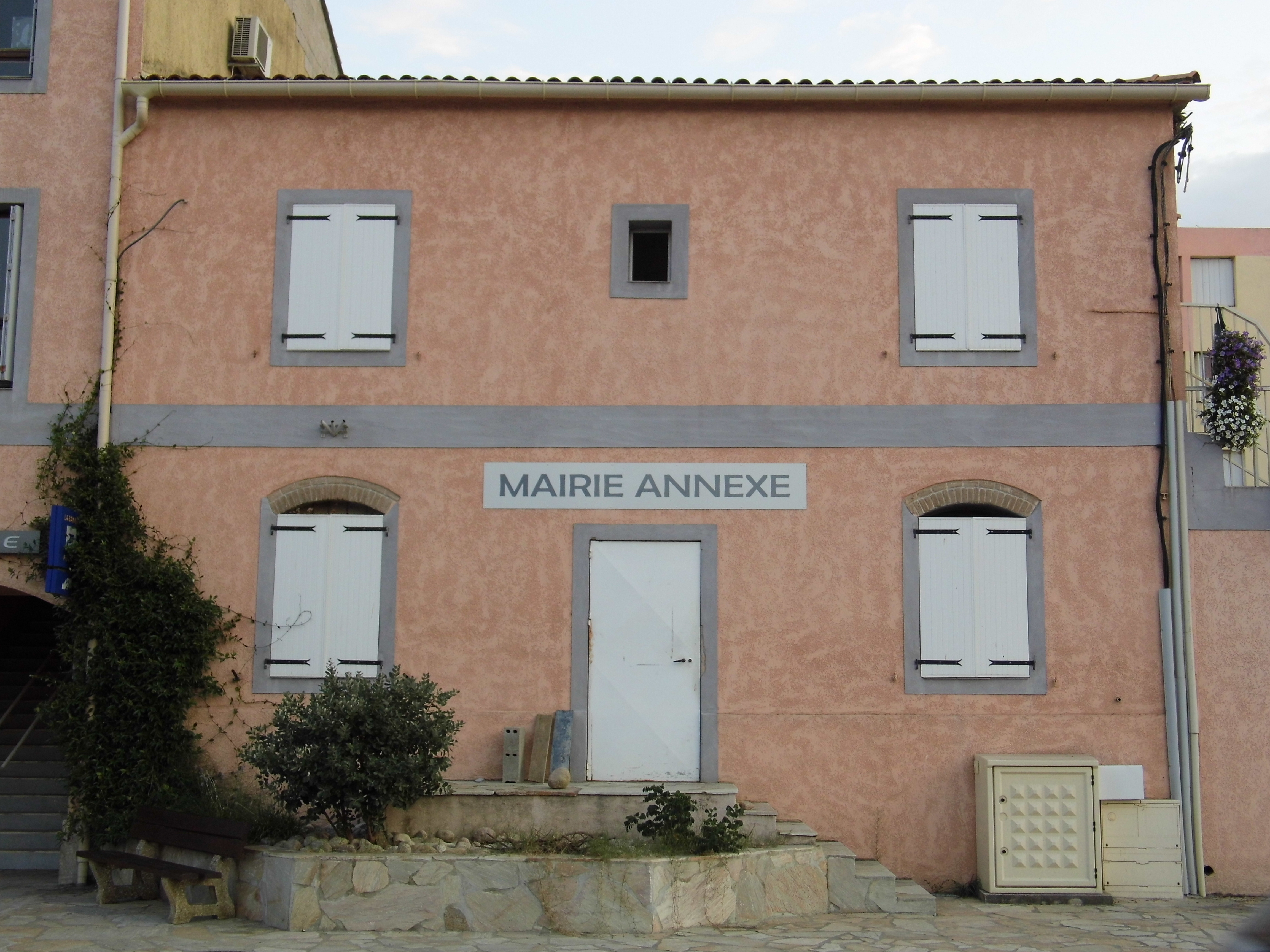 Mairie annexe de Sari-Solenzara, en Corse